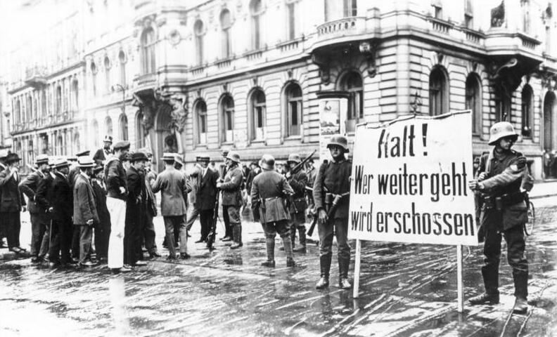 ADN-ZB/Archiv Konterrevolutionärer Kapp-Putsch vom 13. - 17.3.1920 in Berlin Die etwa 5.000 Mann starke Marinebrigade II unter dem Befehl von Kapitän Hermann Ehrhardt marschiert, aus Döberitz kommend, in den frühen Morgenstunden des 13. März in Berlin ein. Die Brigade bildet die Militärische Stoßkraft des von Wolfgang Kapp und General Walther von Lüttwitz geführten Putsches. Truppen der Putschisten riegeln das besetzte Regierungsviertel ab, hier Posten am Wilhelmplatz.